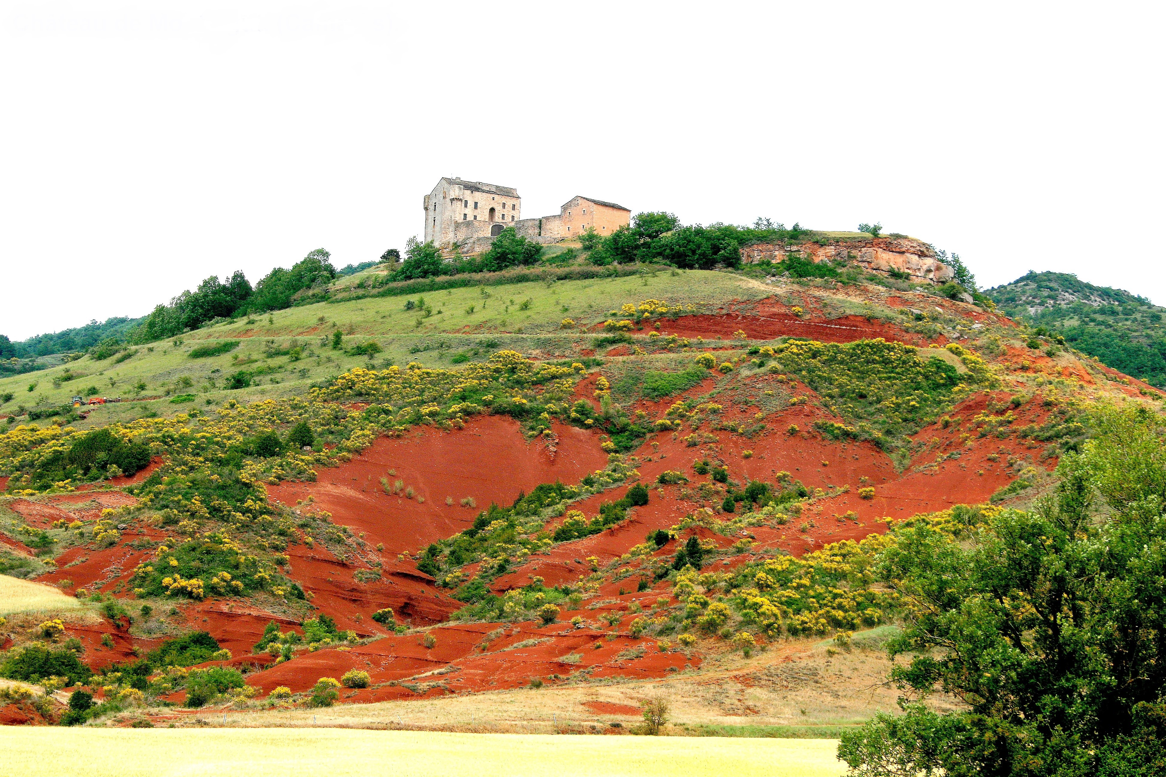 Château de Montaigut. Camarès. Aveyron.